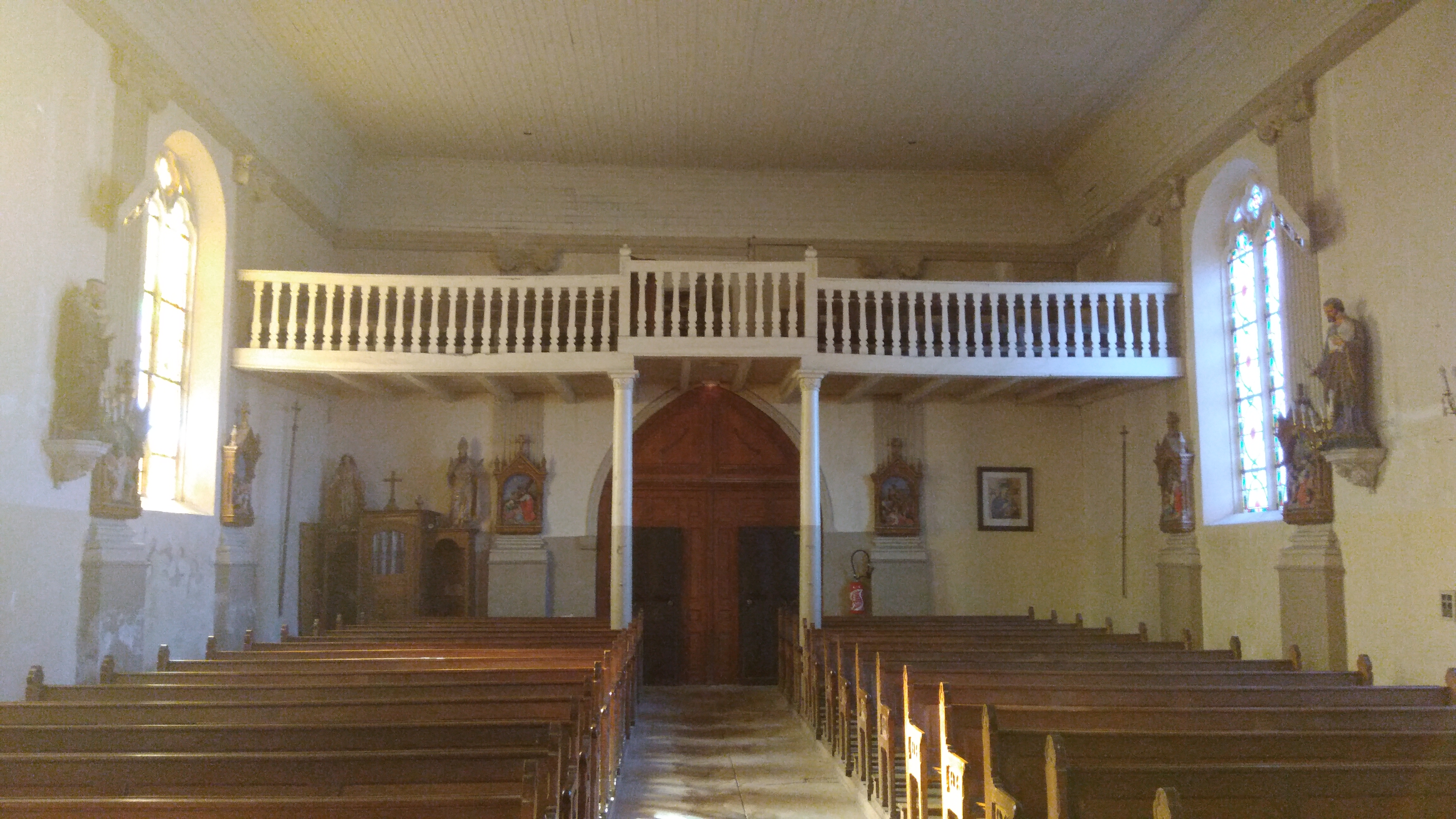 Intérieur Eglise Rouvres